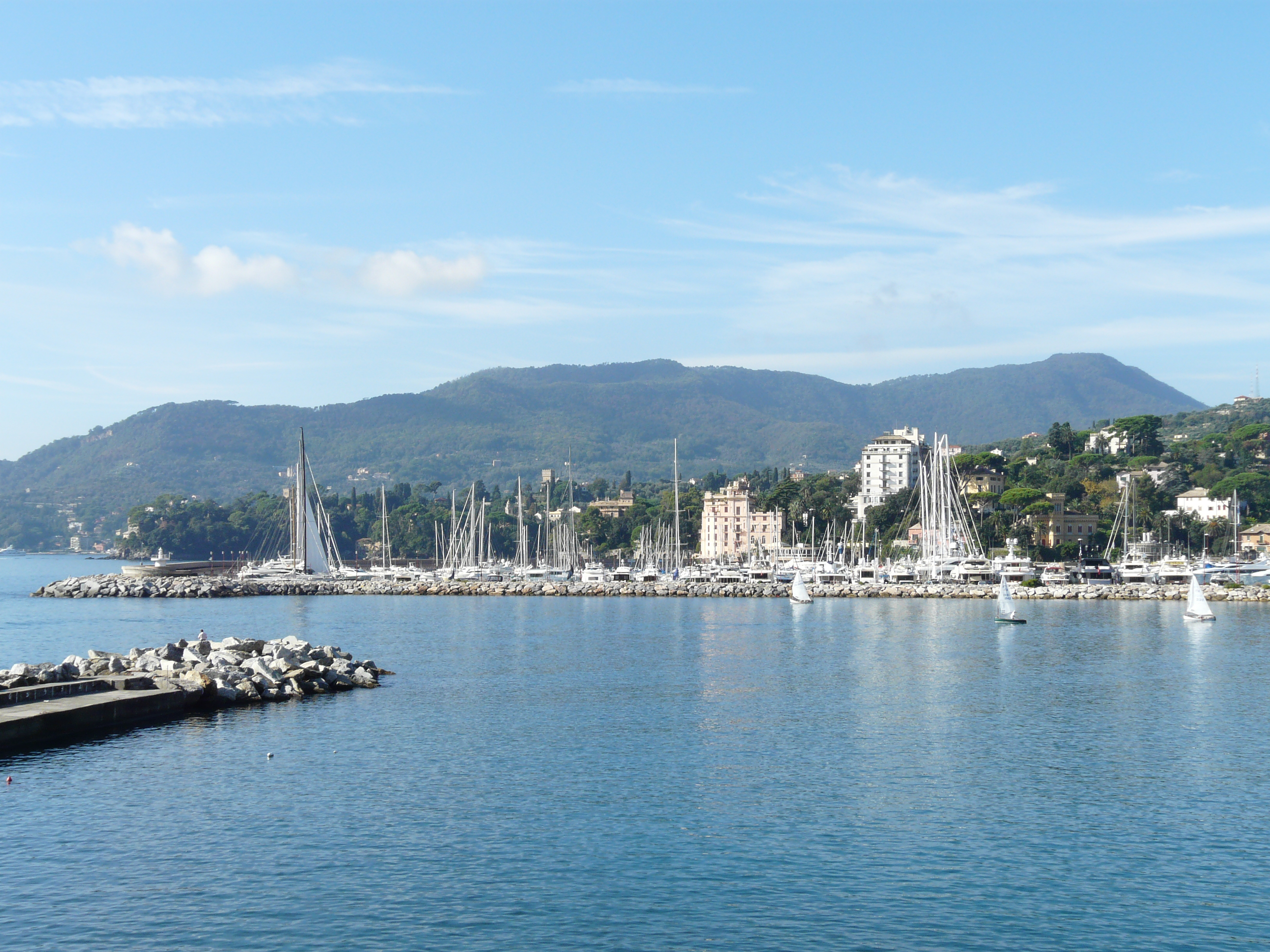 Porto Carlo Riva, Rapallo, Liguria, Italia